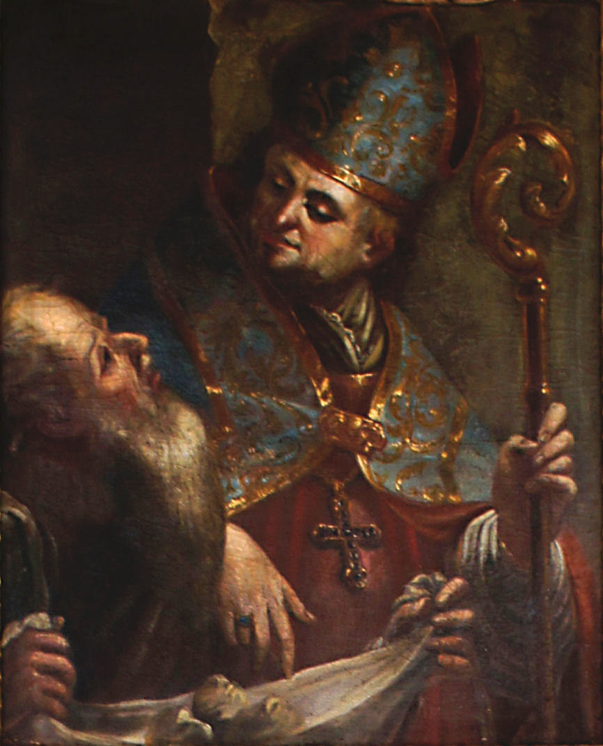 Porträtgemälde von Gerold von Waldeck, Bischof von Freising, im Fürstengang zwischen Fürstbischöflicher Residenz und Freisinger Dom.